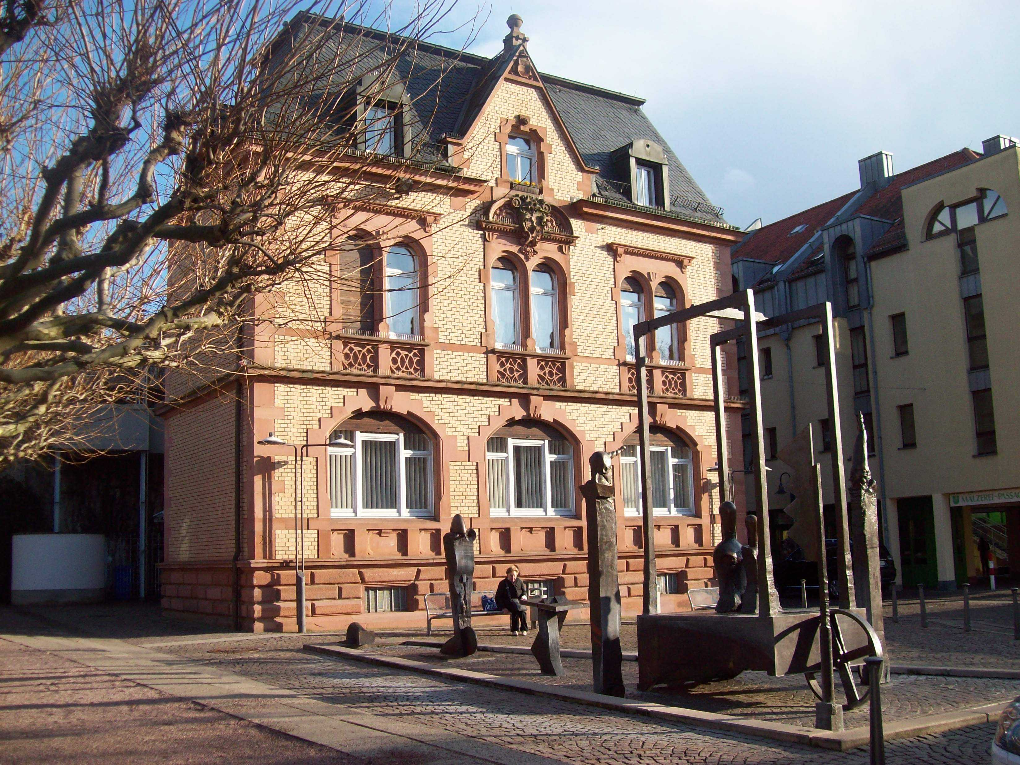 Rabbinatsgebäude am Wolfsthalplatz, davor "Zeitwagen" von Rainer Stoltz, Bildhauer